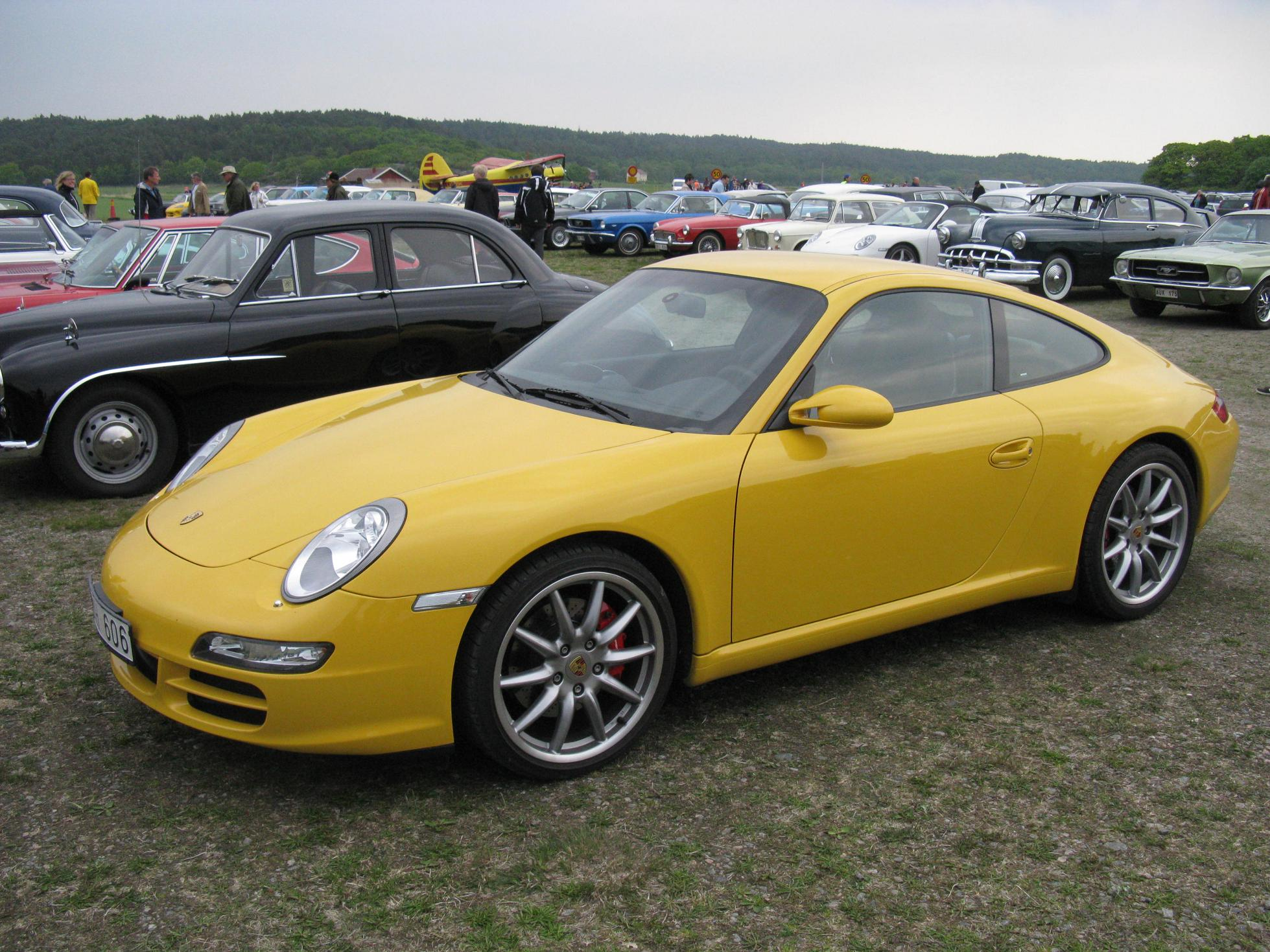 Porsche 911 Carrera S